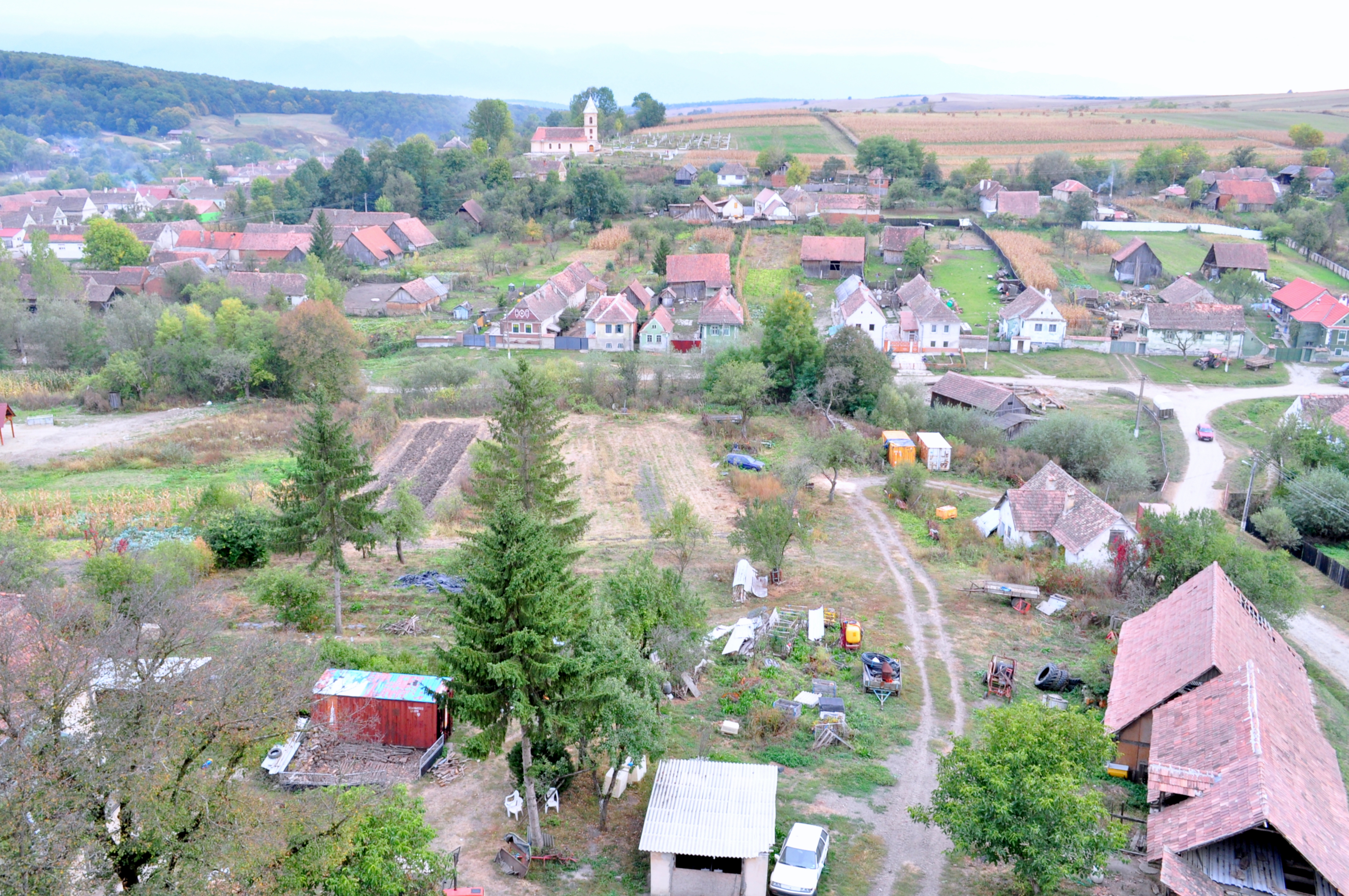 Biserica Înălţarea Domnului din Chirpăr